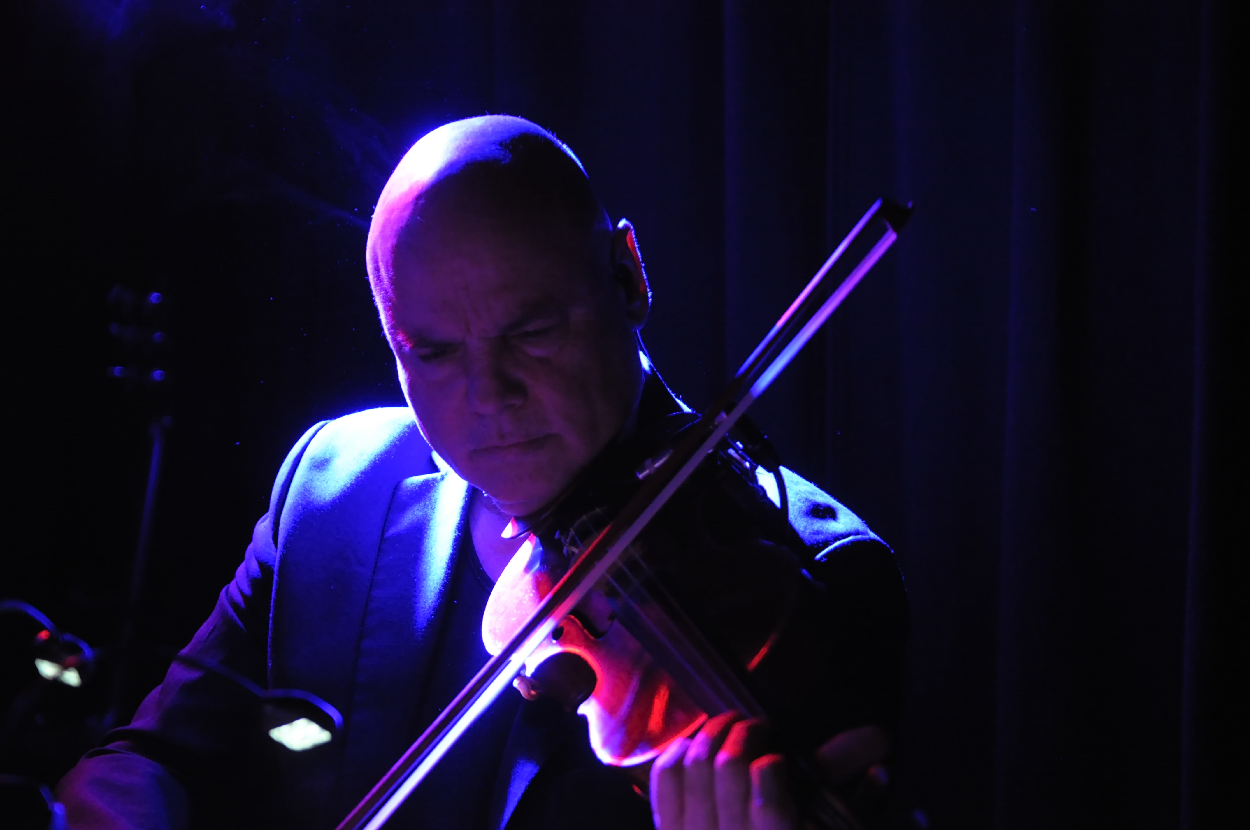 Die Kammer am 12. Dezember 2014 im Live Club Barmen in Wuppertal